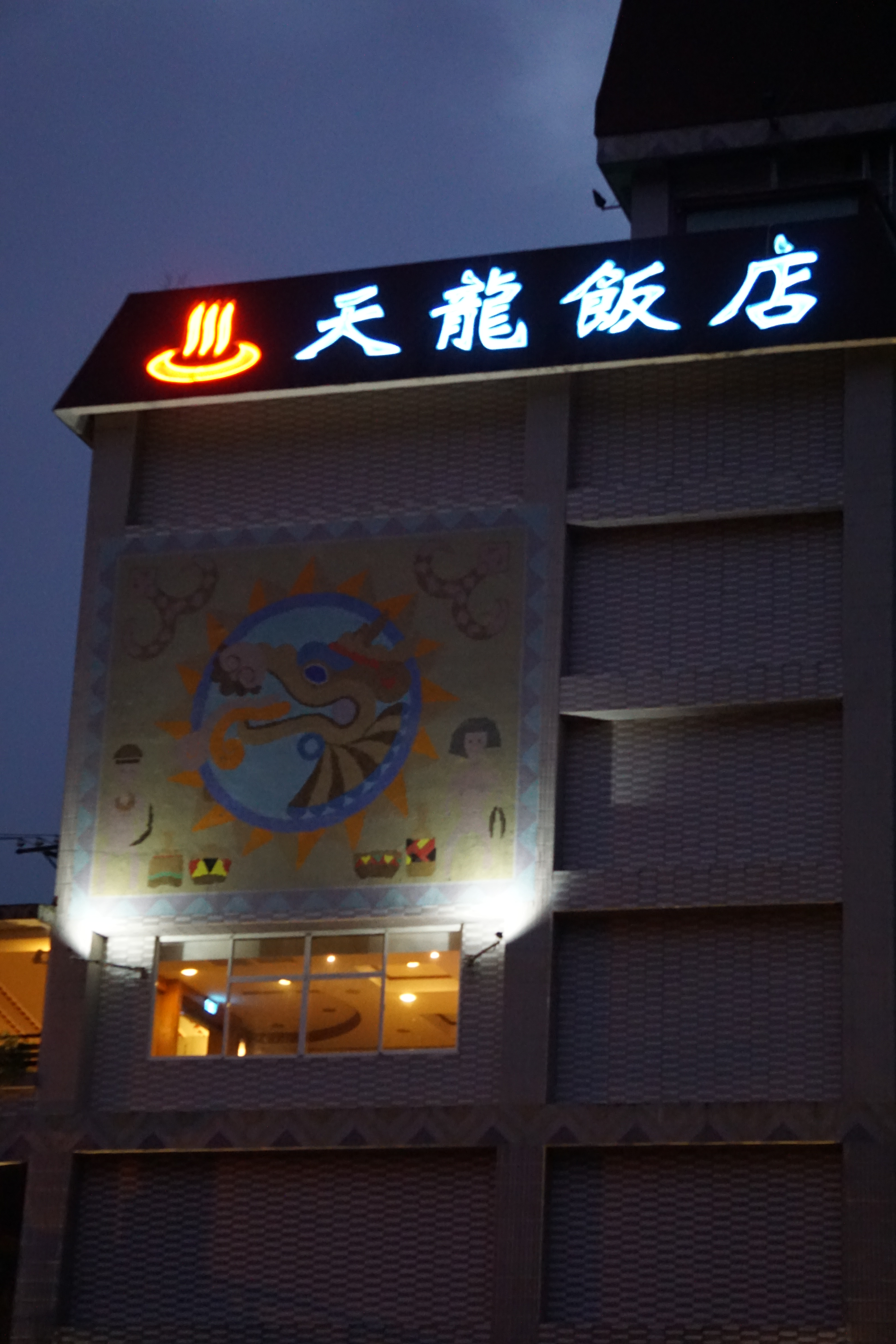 霧鹿温泉にある一軒宿、天龍飯店